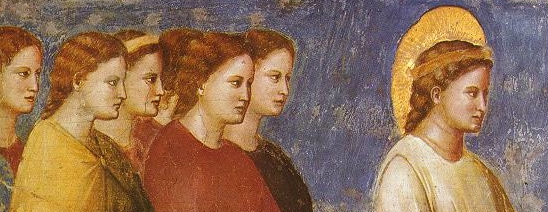 Cappella Scrovegni a Padova, Life of the Virgin. Wedding Procession (detail)